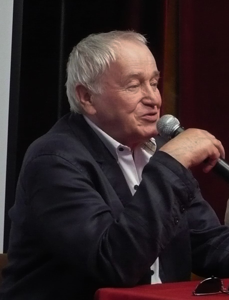 Jan Nowicki w Nowej Rudzie